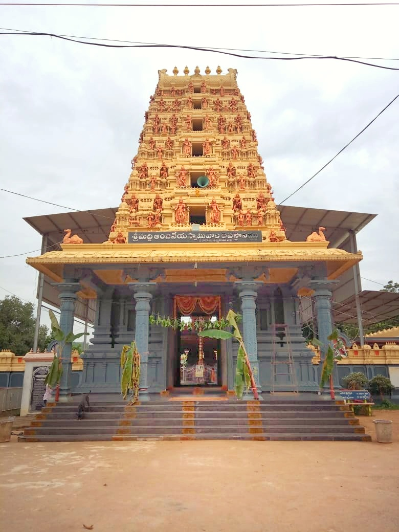 శ్రీ మద్ది ఆంజనేయ స్వామి దేవాలయం జగ్గరెడ్డిగూడెం